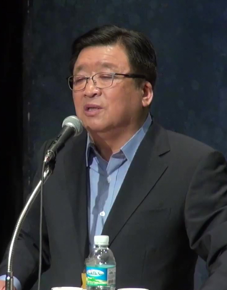 (싹튜브) 서종예 前주일대사 권철현 새누리당 상임고문 특강 - 시련이 곧 축복이다